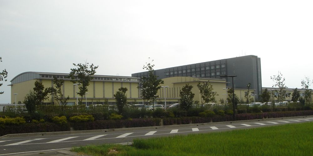 岐阜県立看護大学(岐阜県羽島市) 東海道新幹線沿線の南側にあり、北側より撮影